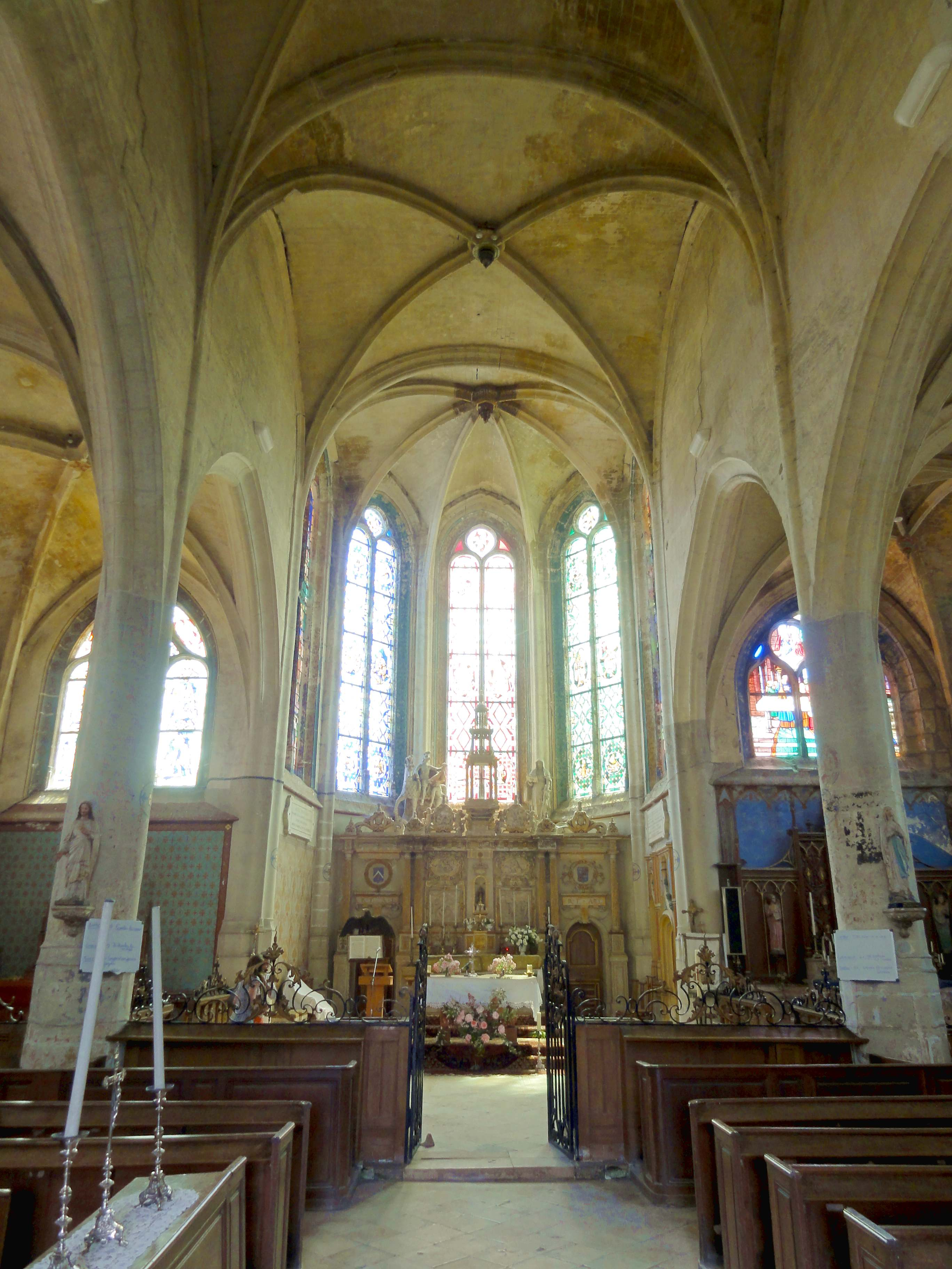 Intérieur de l'église Saint-Martin de Versigny (voir titre).